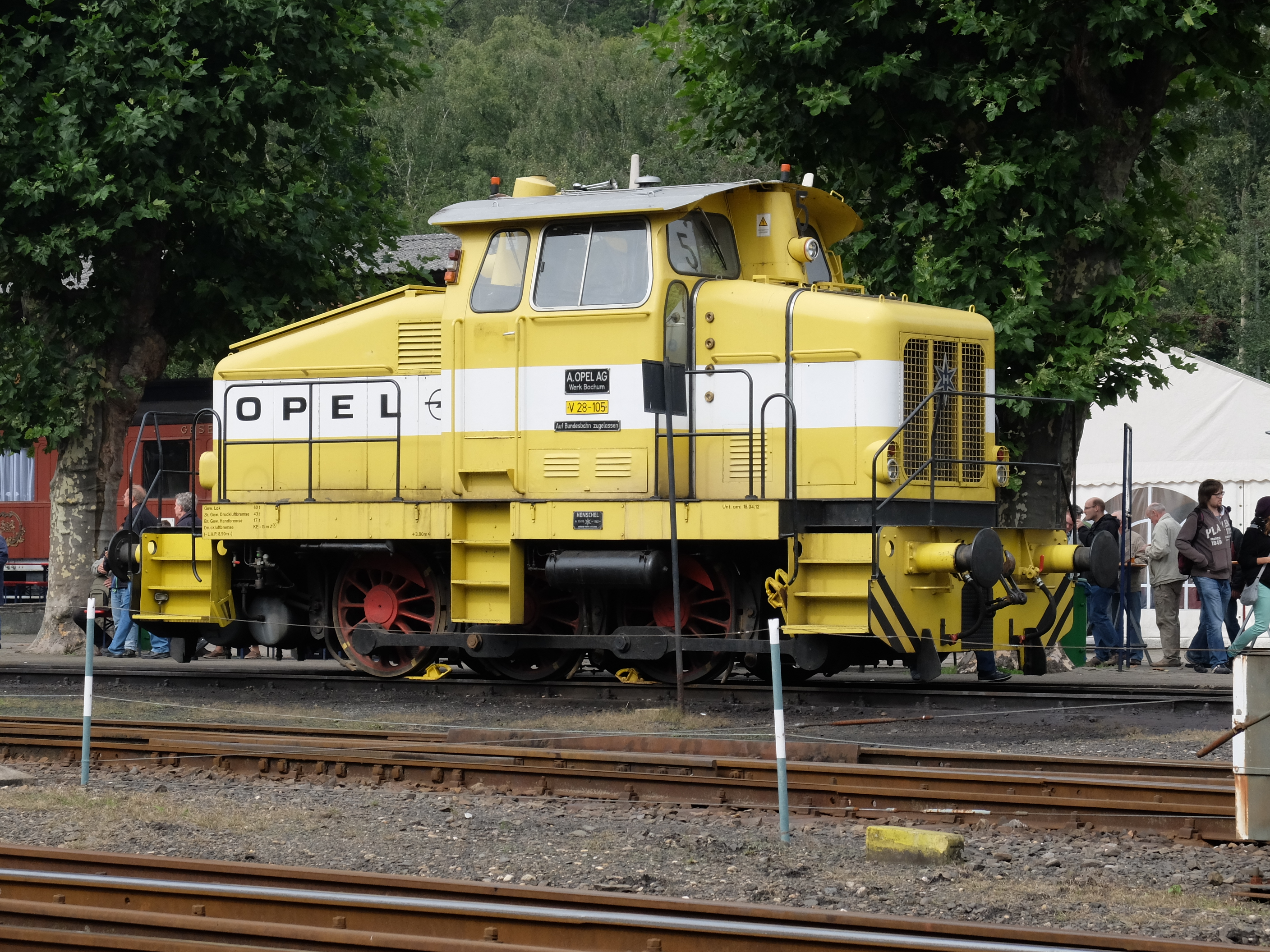 Adam Opel AG V 28-105 im Eisenbahnmuseum Bochum-Dahlhausen (Typ Henschel DH 500 Ca)